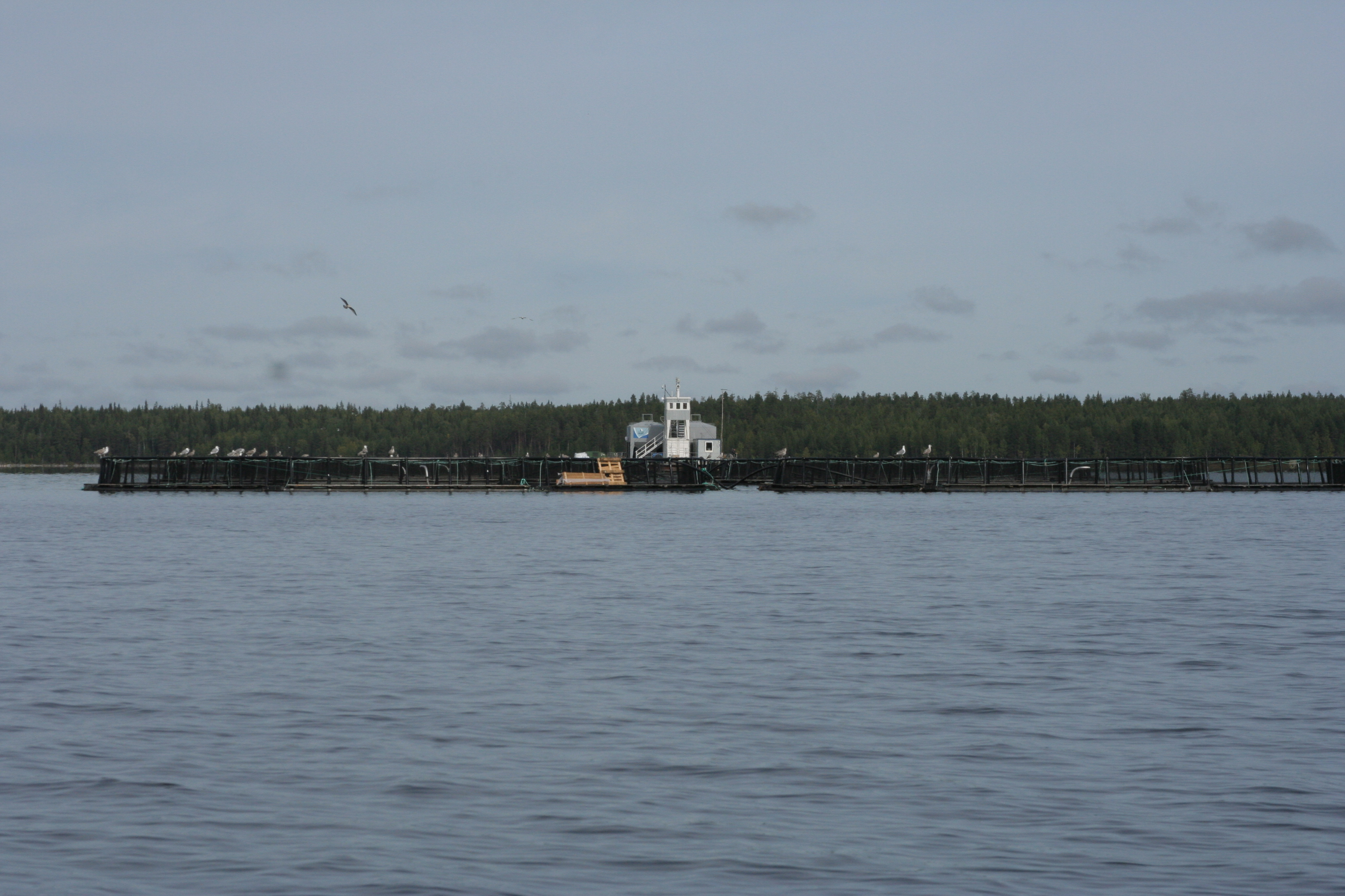 Се́гозеро, Медвежьегорский район, Республика Карелия, Россия